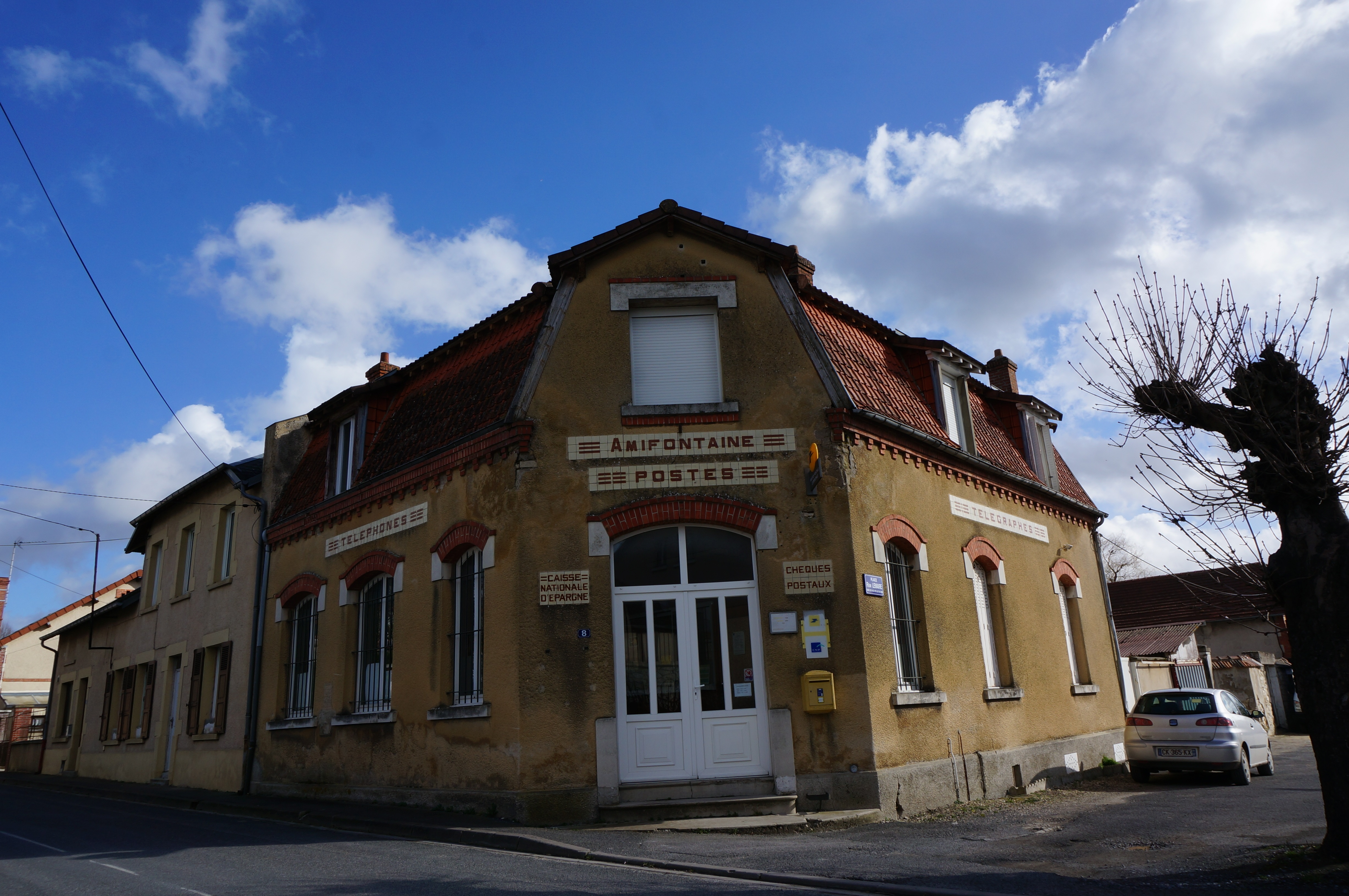 Vues d'Amifontaine.